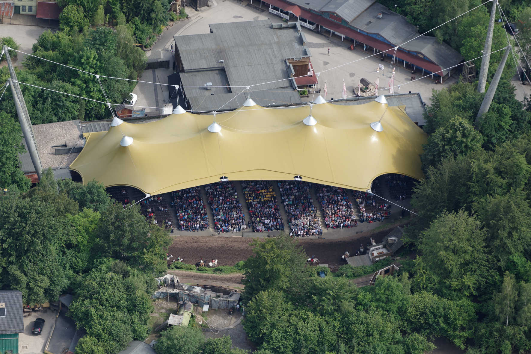 Während der Vorstellung von Der Schatz im Silbersee bei den Karl-May-Festspielen in Elspe wurde das Gelände beim Sauerland Fotoflug-West vom Wikipedia-Projekt Sauerland überflogen.